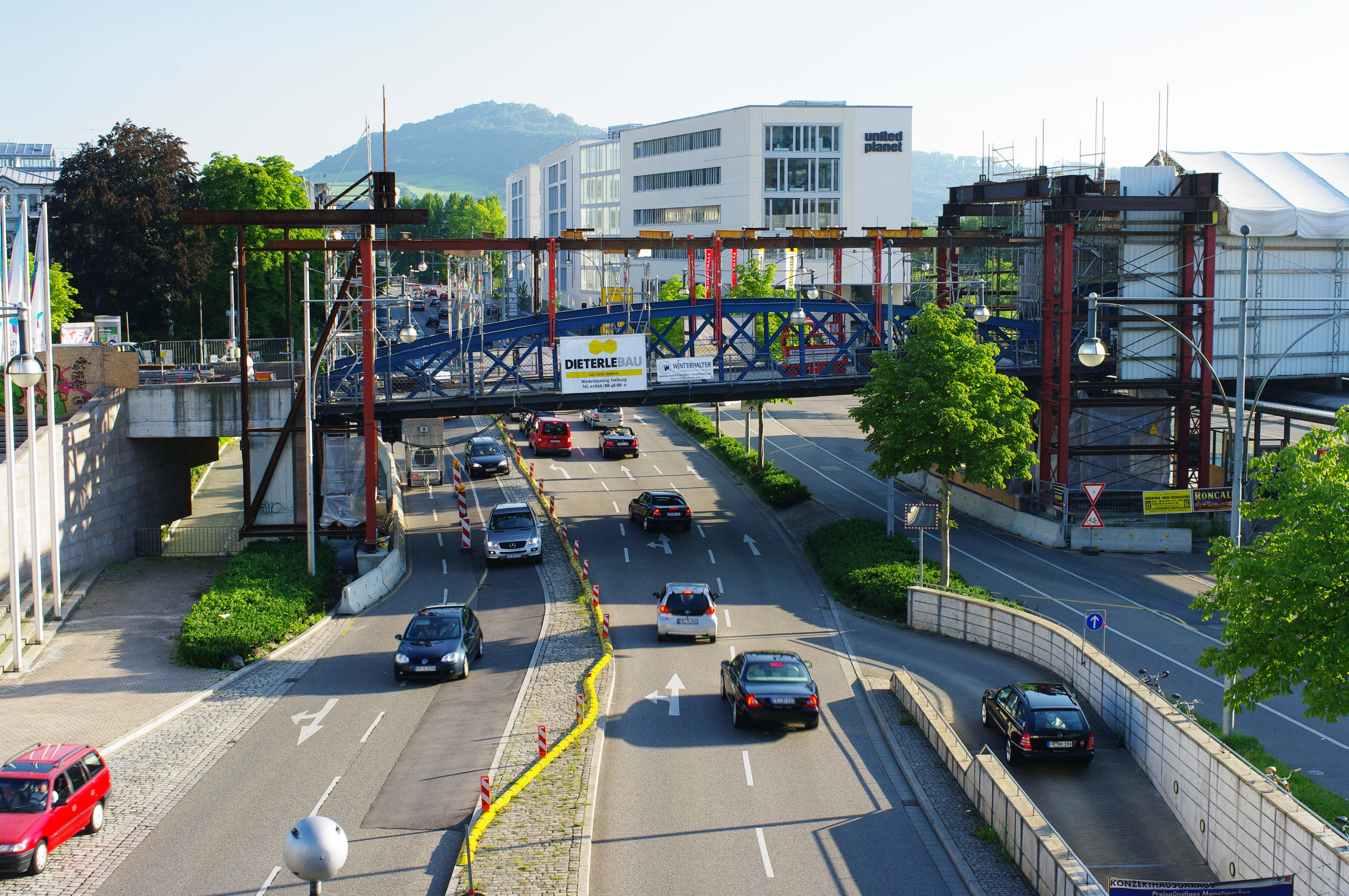 Die Baugerüste werden nach der langen Renovierung von der Wiwili-Brücke entfernt.